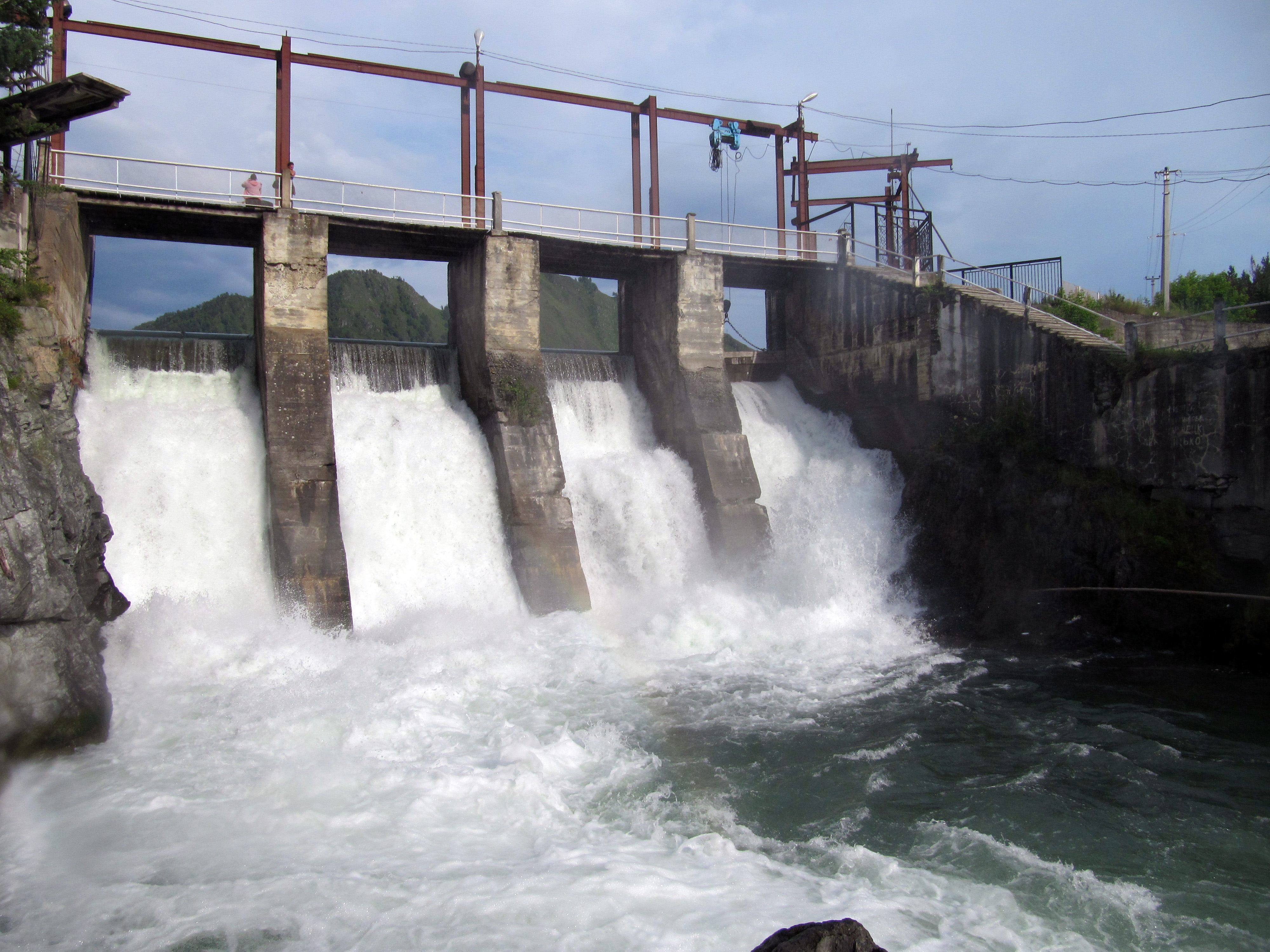 Чемальская Гэс